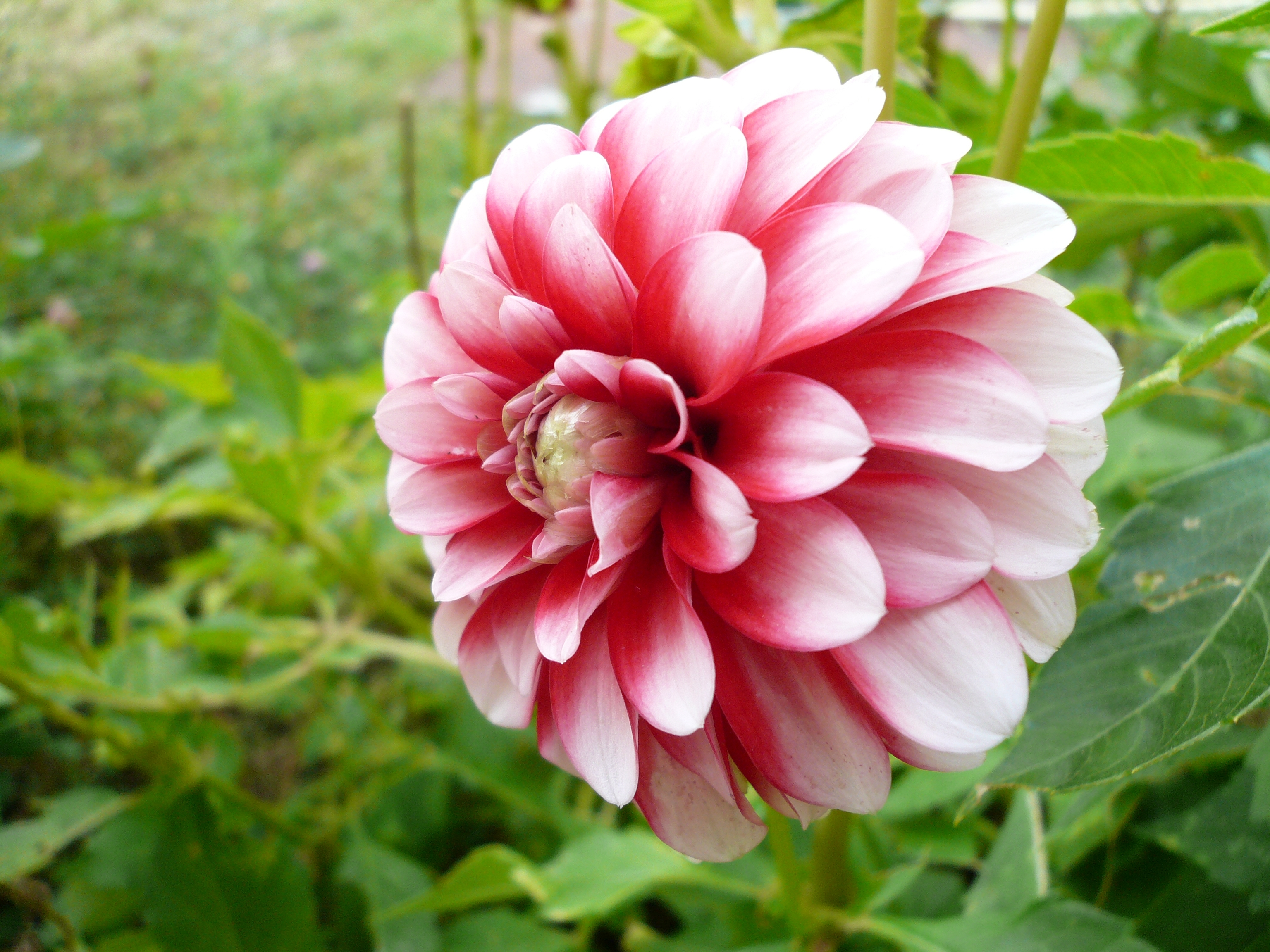 Dahlia rose et blanc